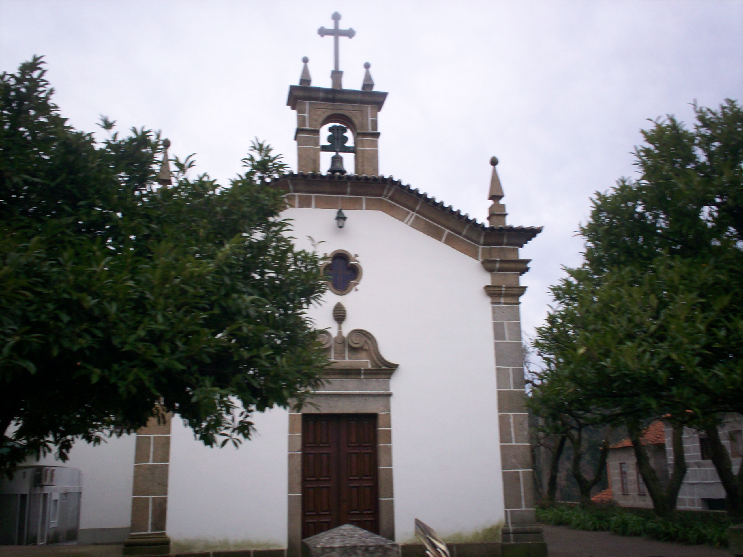 Capela do Hospital, antiga Igreja de Riba de Ave